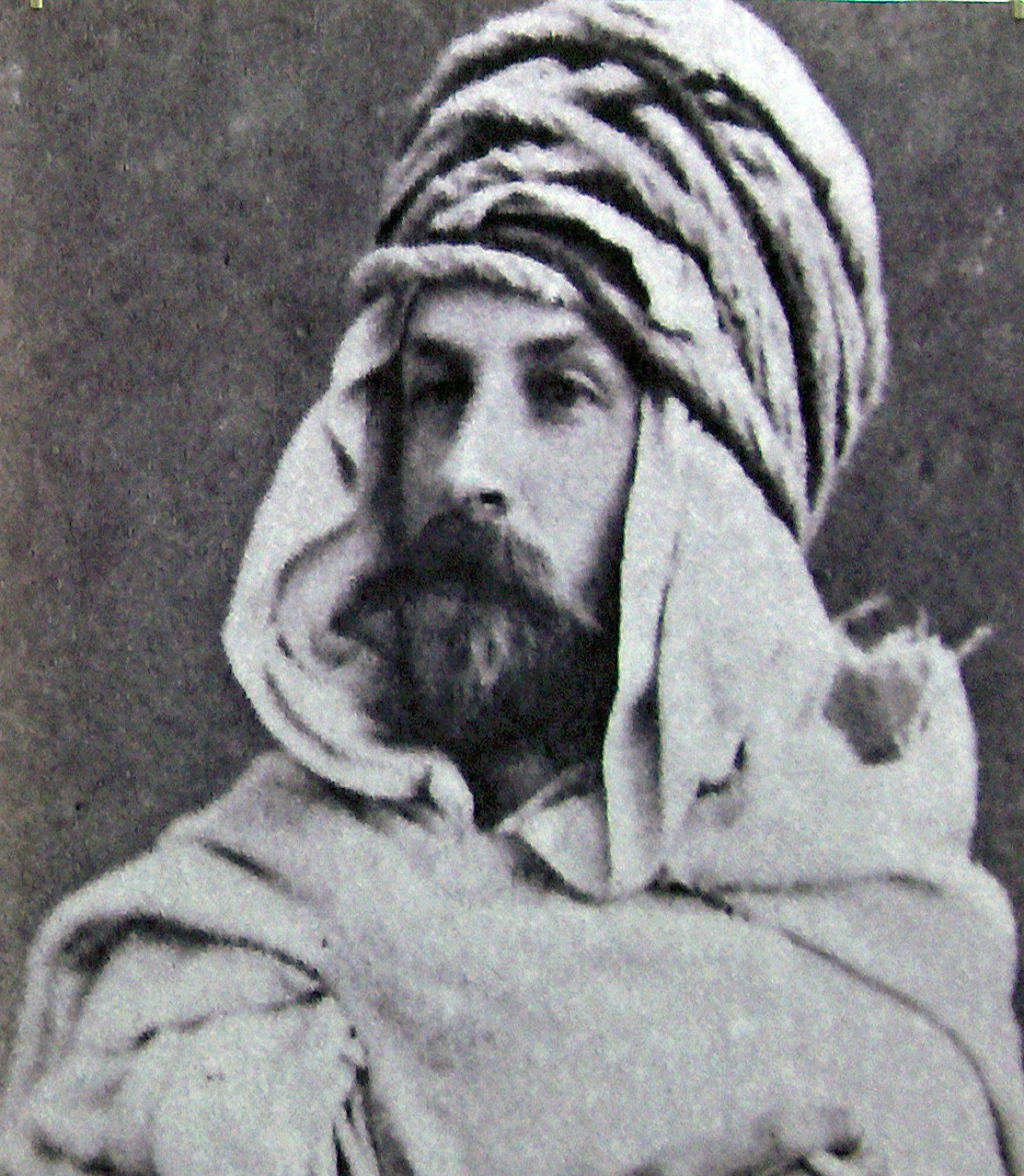 "Emile Claus in boernoes" (Noord-Afrika, 1879); anonieme fotograaf; privé-collectie